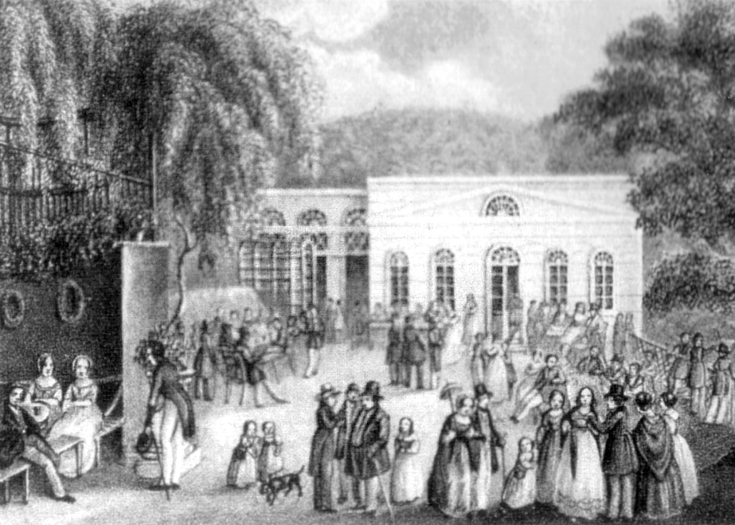 Andrees Berggarten